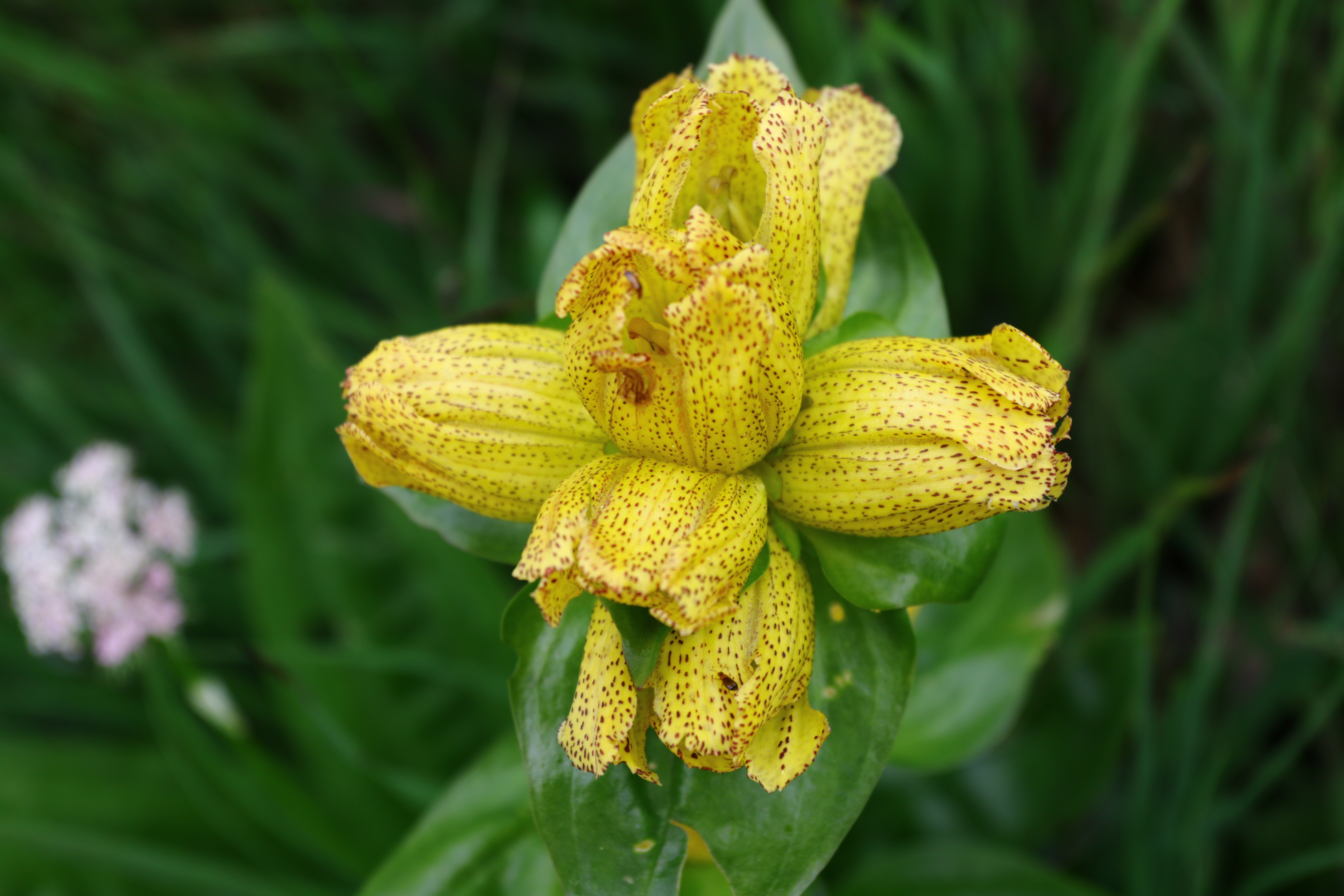 Hořec tečkovaný květ